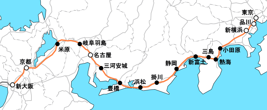 東海道新幹線路線図